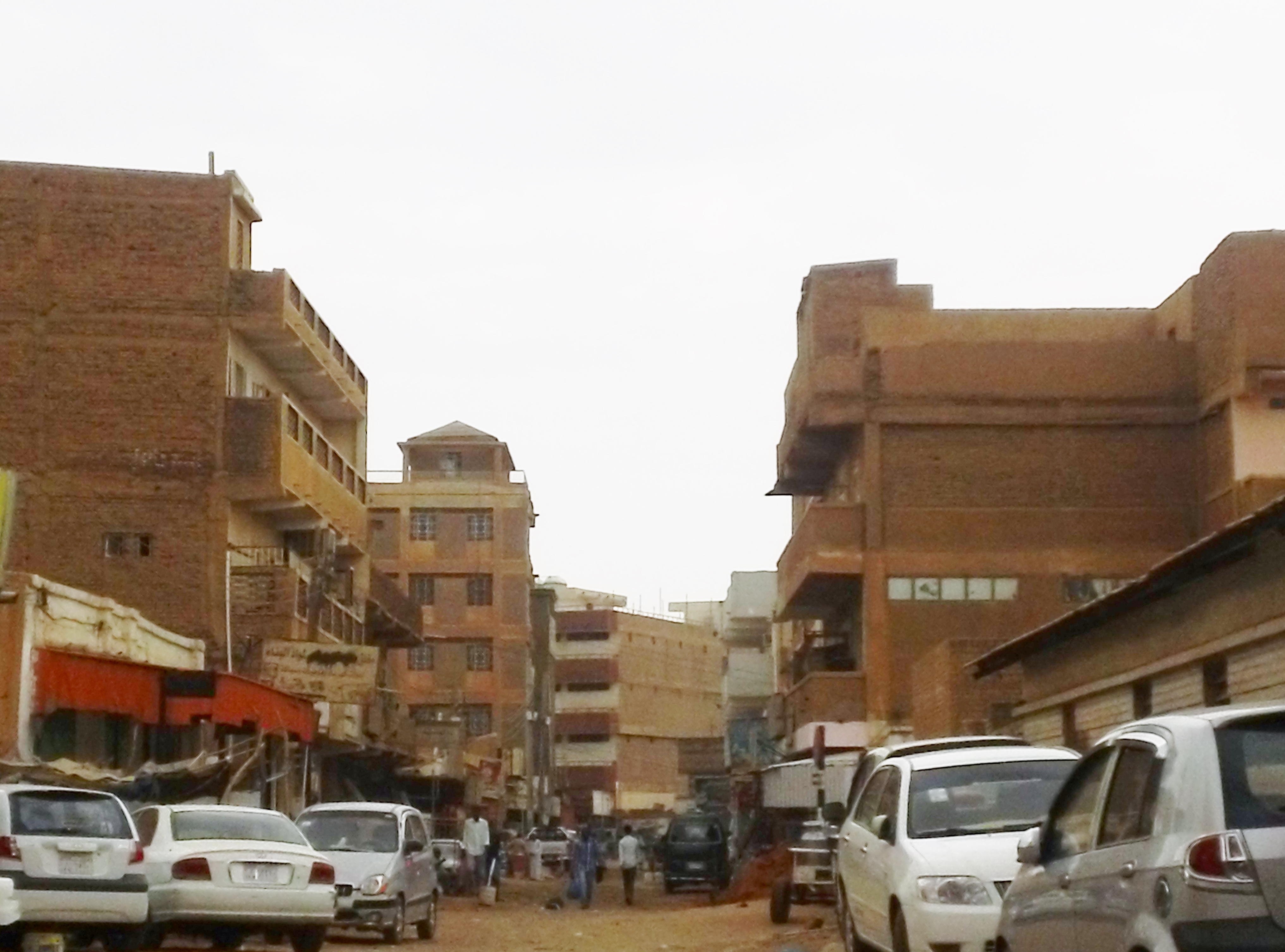 Omdurman market behind Omdurman ancient mosque Sudan